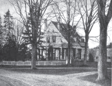 Stephen Barker Place, 165 Haverhill Street, Methuen, Massachusetts